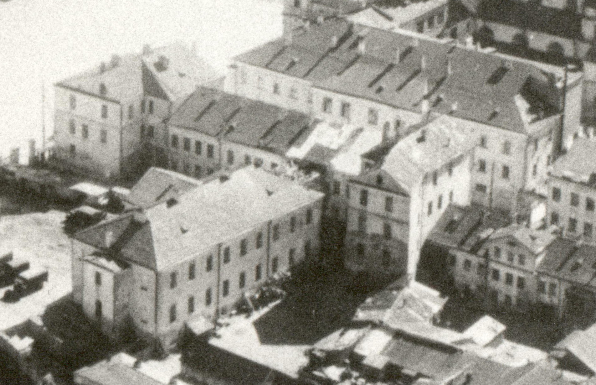 Беларуская (тарашкевіца): Менск (Miensk), Высокі Рынак (Vysoki Rynak). Палац Празьдзецкіх (Praździecki). Аэрафотаздымак